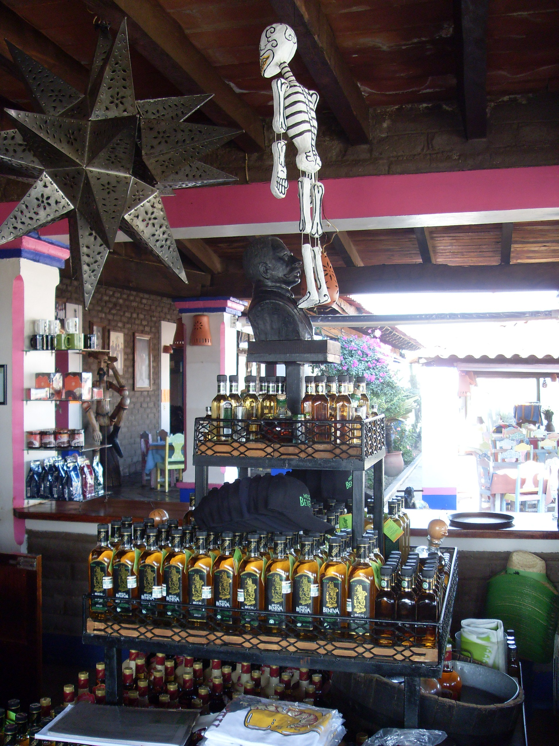 Wnętrze sklepu z tequilą w Meksyku. Ozdoby w stylu "Katrina" z okazji Wszystkich Swiętych